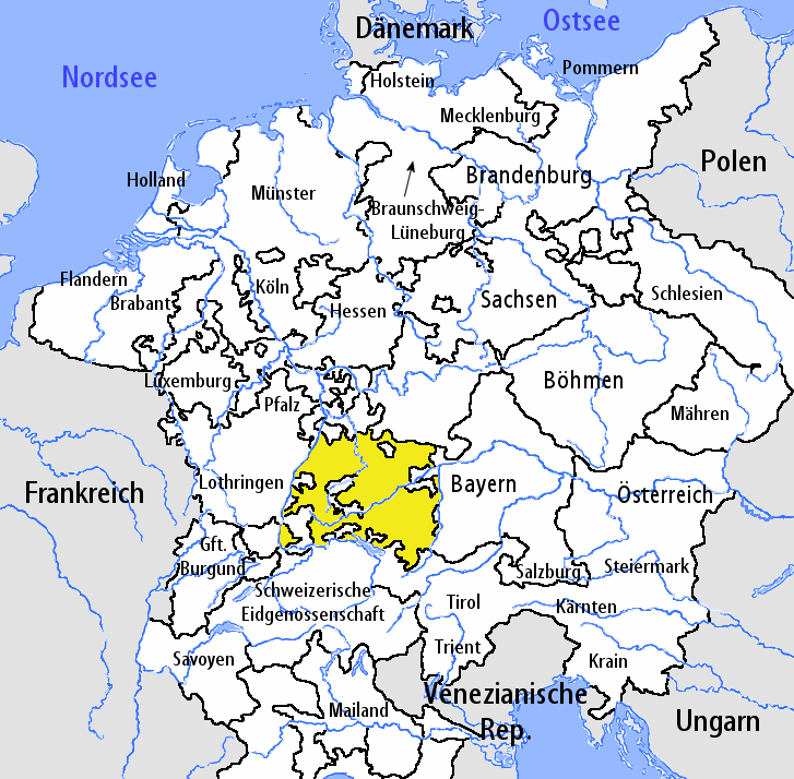 Eine Karte der Reichskreise wie am Anfang des 16. Jahrhunderts. Der Schwäbische Reichskreis ist gelb gefärbt.